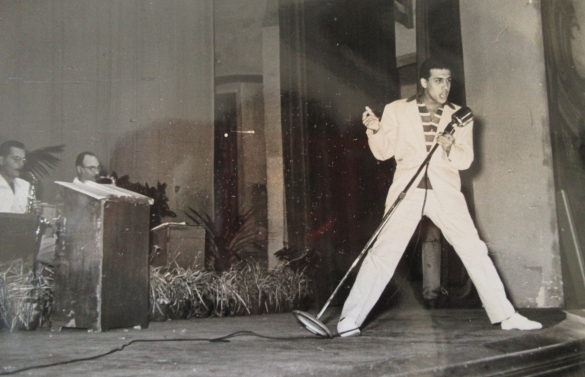 Adriano Celentano si esibisce al Teatro Nuovo di Salsomaggiore Terme